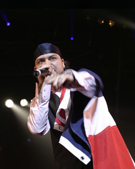 Concierto En el Teatro Zenith de Paris